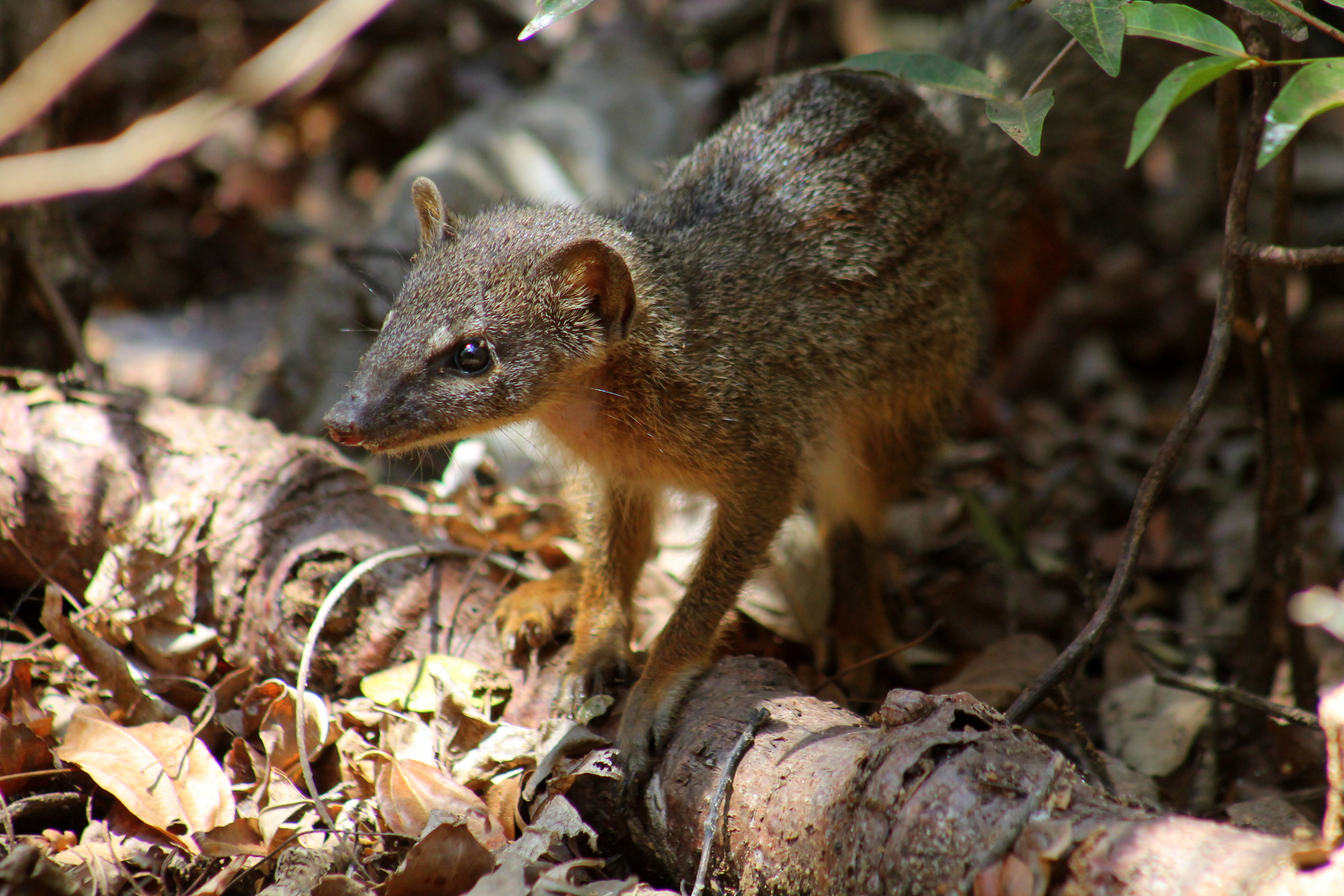 Smalstreepmangoest in Kirindy